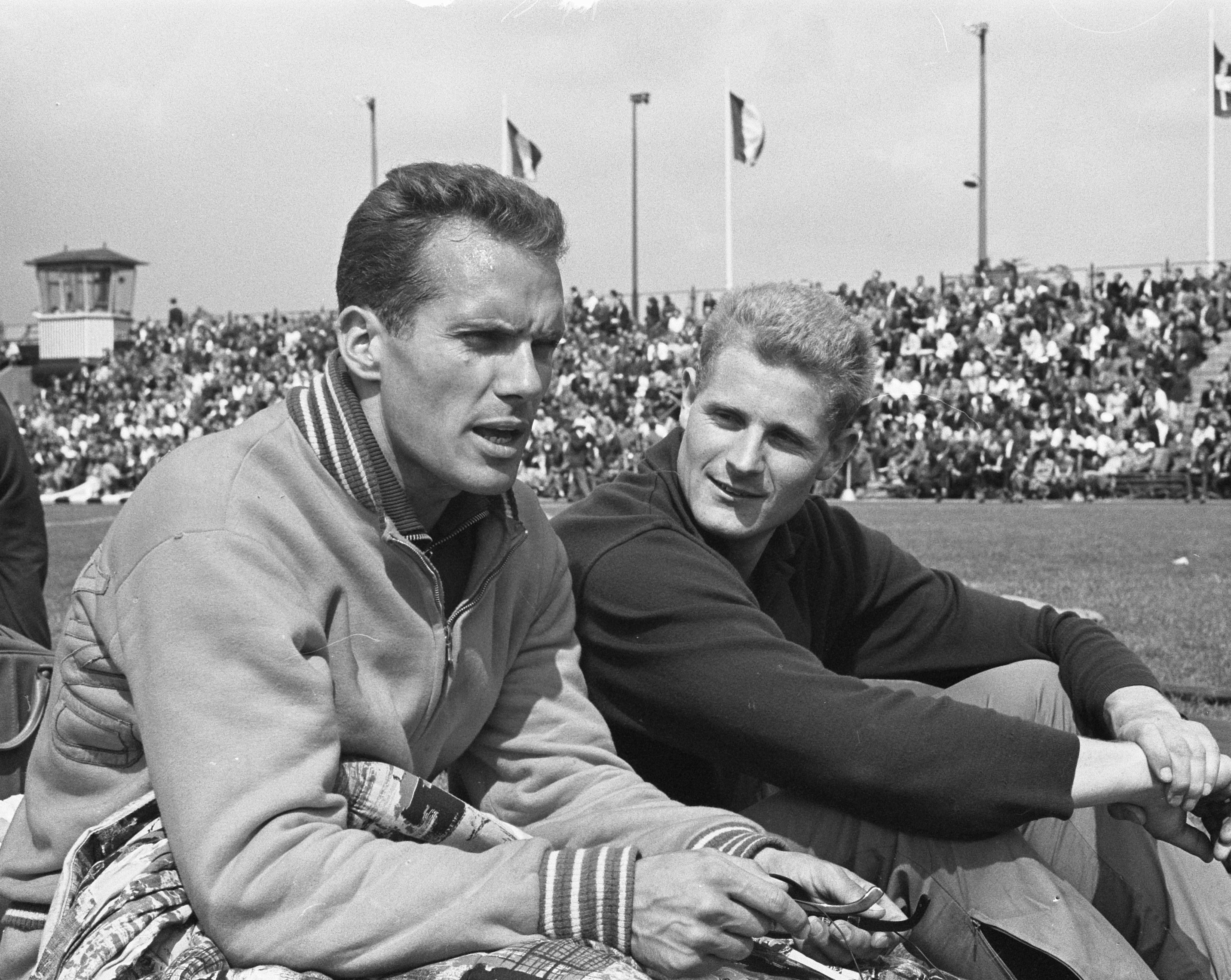 Eef Kamerbeek (links) in gesprek met Werner von Moltke (Duitsland) )